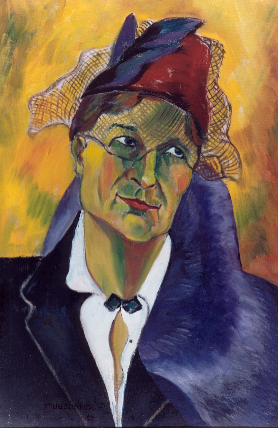 Hanna Bekker. Weiße Kalla in blauer Vase. Öl auf Leinwand, um 1948. 72 x 59 cm. Stadtmuseum Hofheim am Taunus. Rechteinhaber: wird ergänzt. Reproduktion: Stadtmuseum Hofheim am Taunus